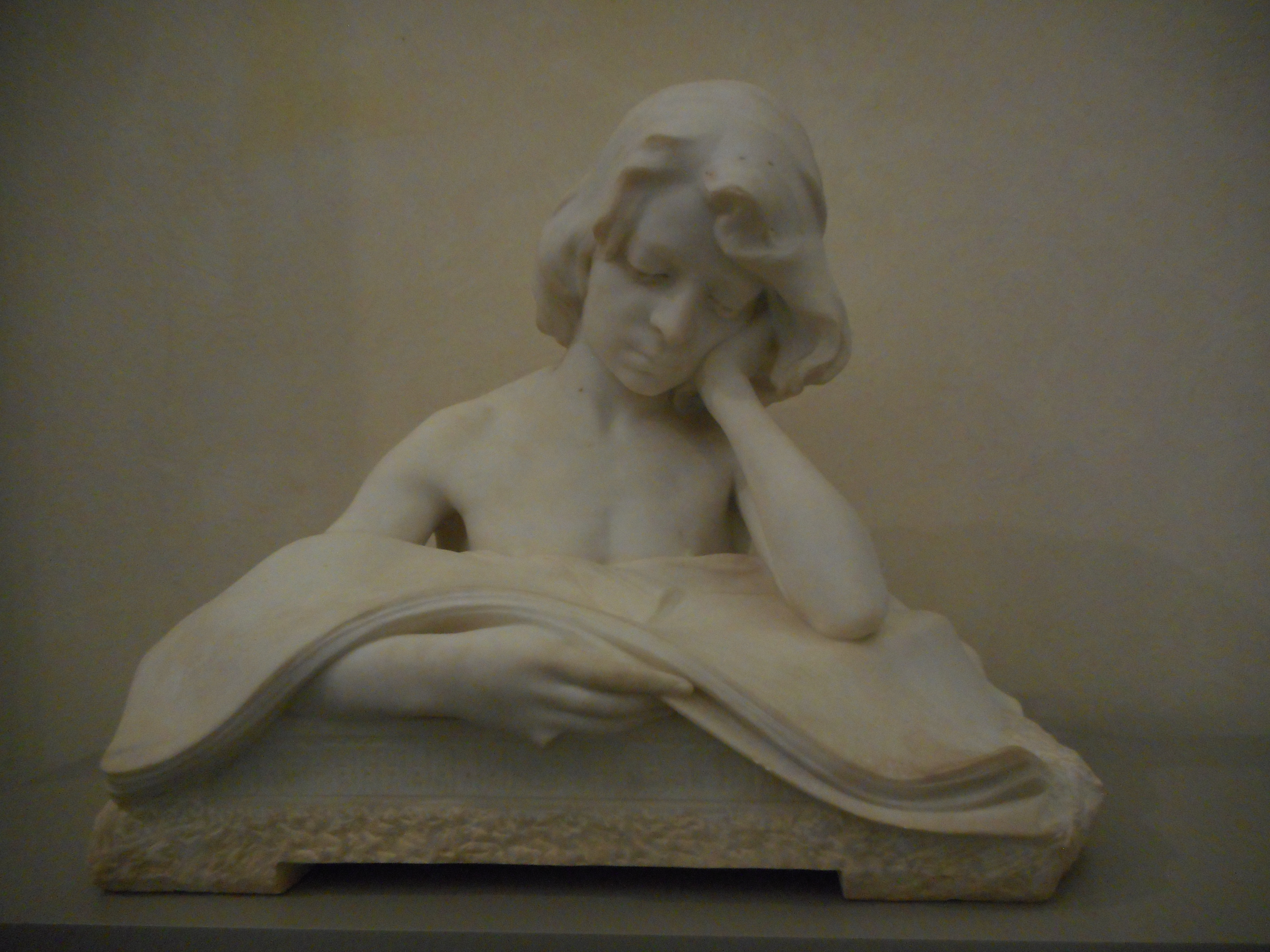 Buste de 1910